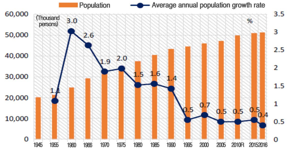 Динамика численности населения и его годовой рост 1945-2016